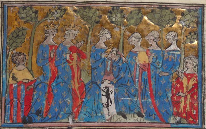 Philippe IV le Bel consolé par ses proches